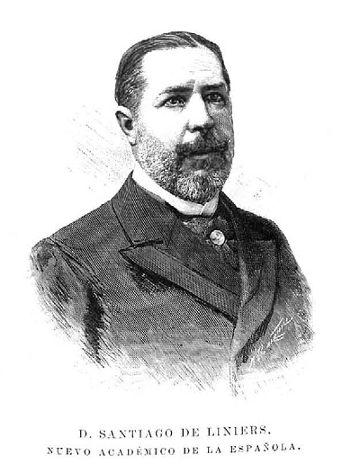 Santiago de Liniers, nuevo académico de la lengua, en la revista La Ilustración Española y Americana.